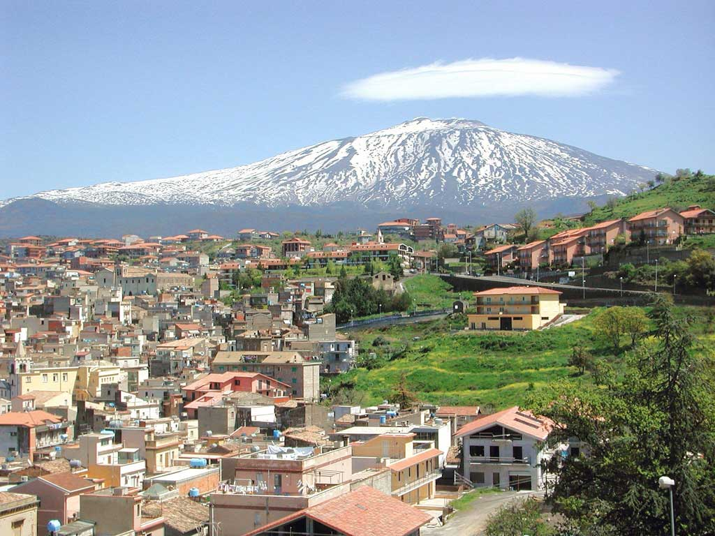 foto zino